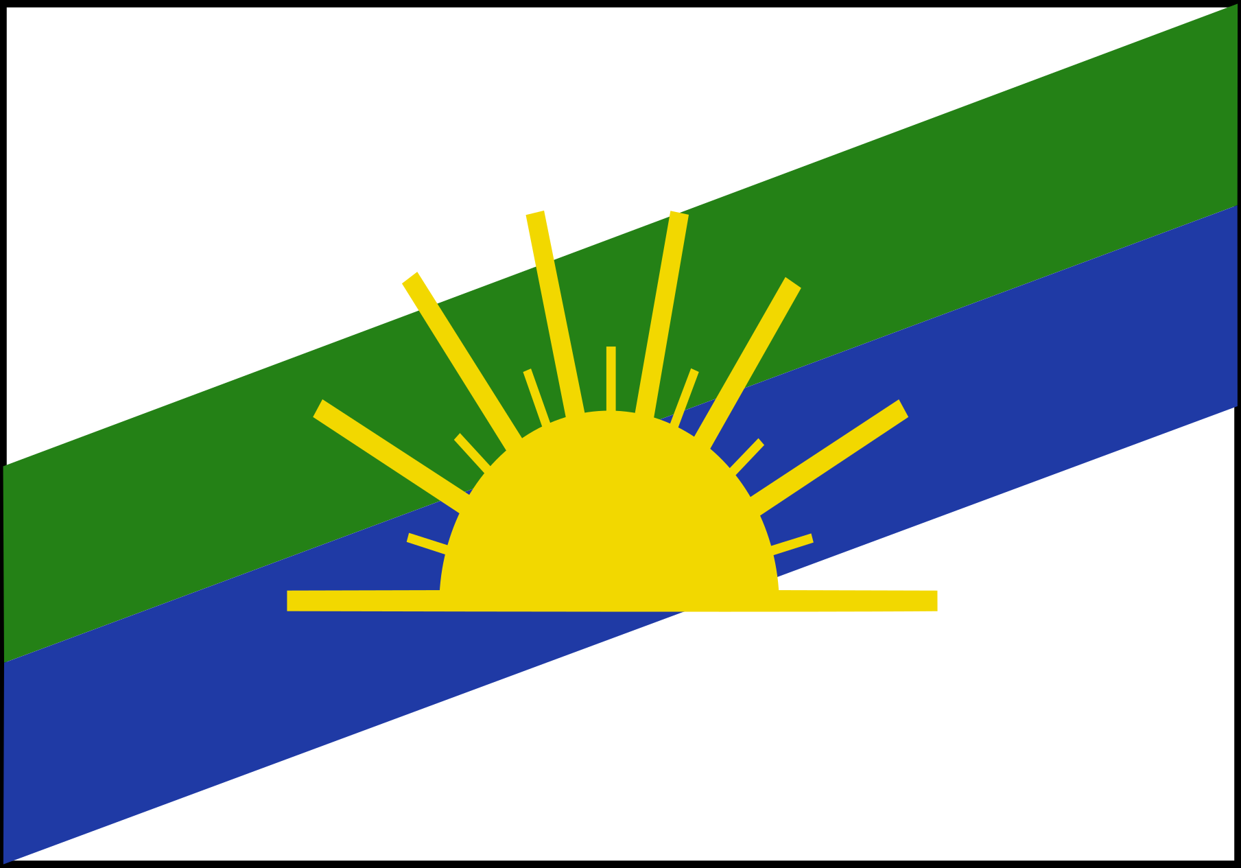 Bandeira do município de Lagoa da Confusão